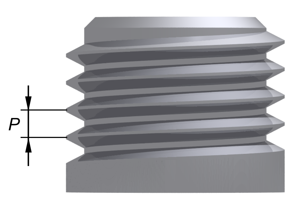 En gängas delning